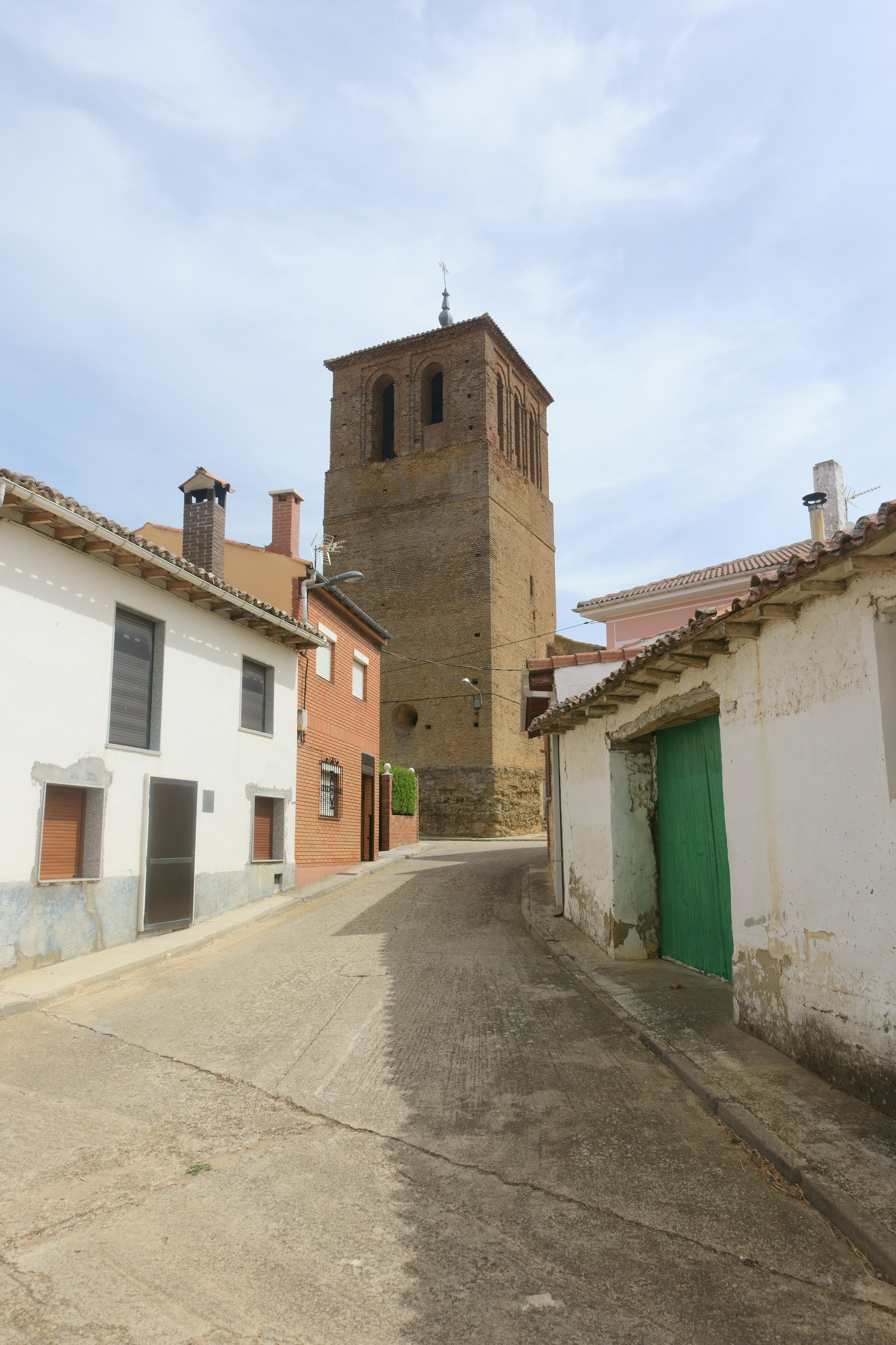 Iglesia de Nuestra Señora del Castillo, Villalcón (Palencia, España).